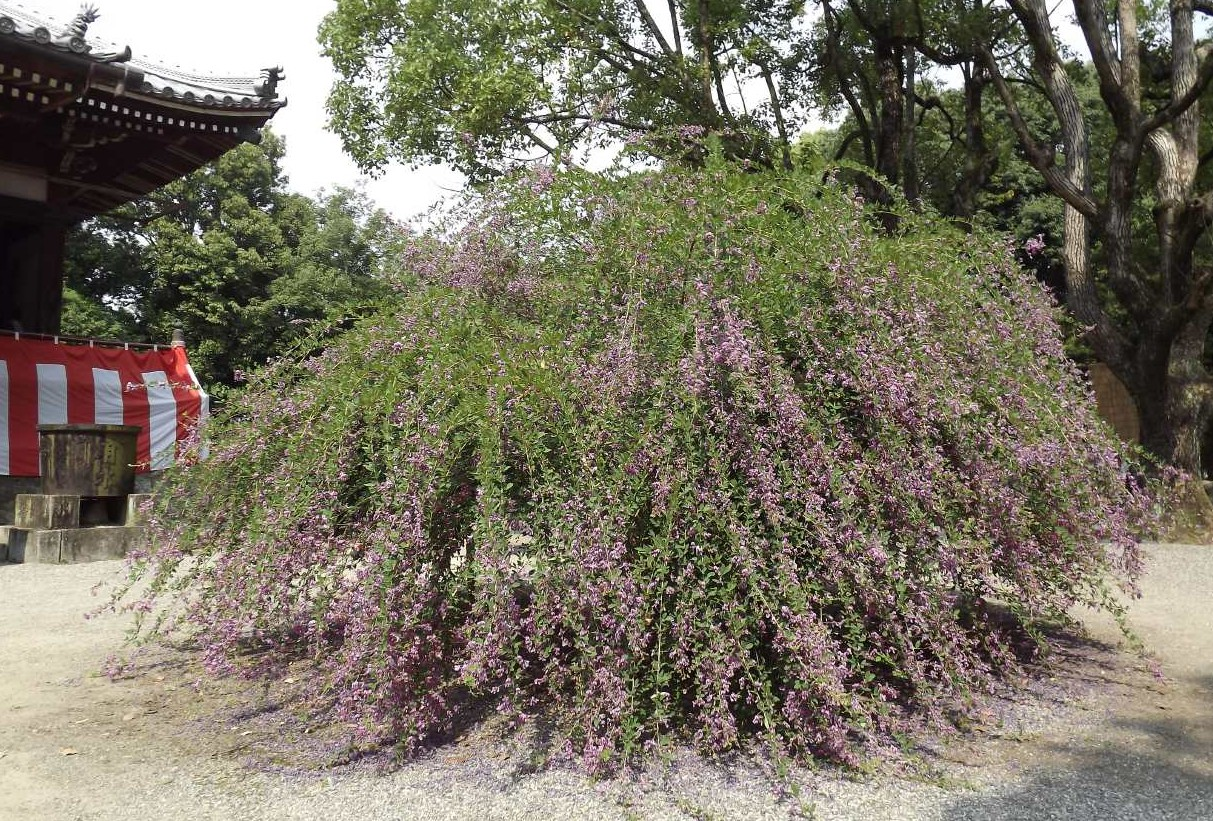 萩原寺の本堂前でもハギが咲き乱れる